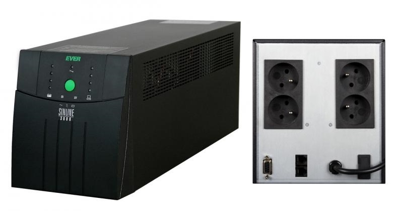 EVER ups sinline 3000 zasilacz awaryjny